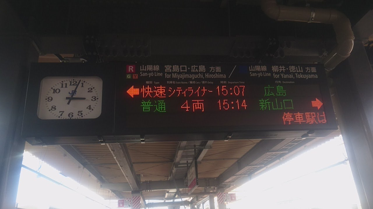 岩国駅CTC連動発車標